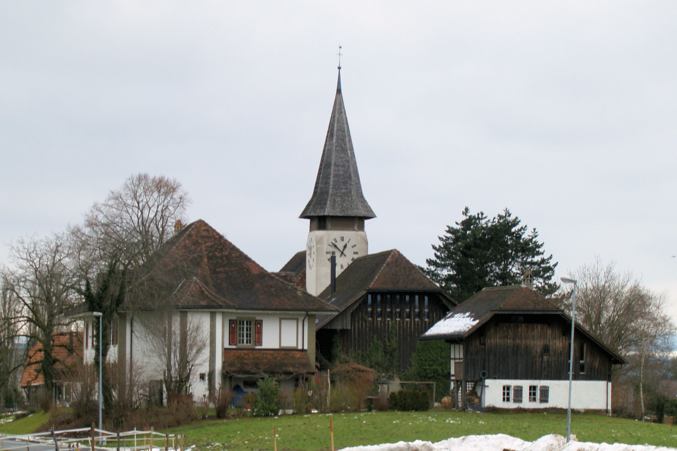 Kirche Grafenried BE (Ansicht von Westen)